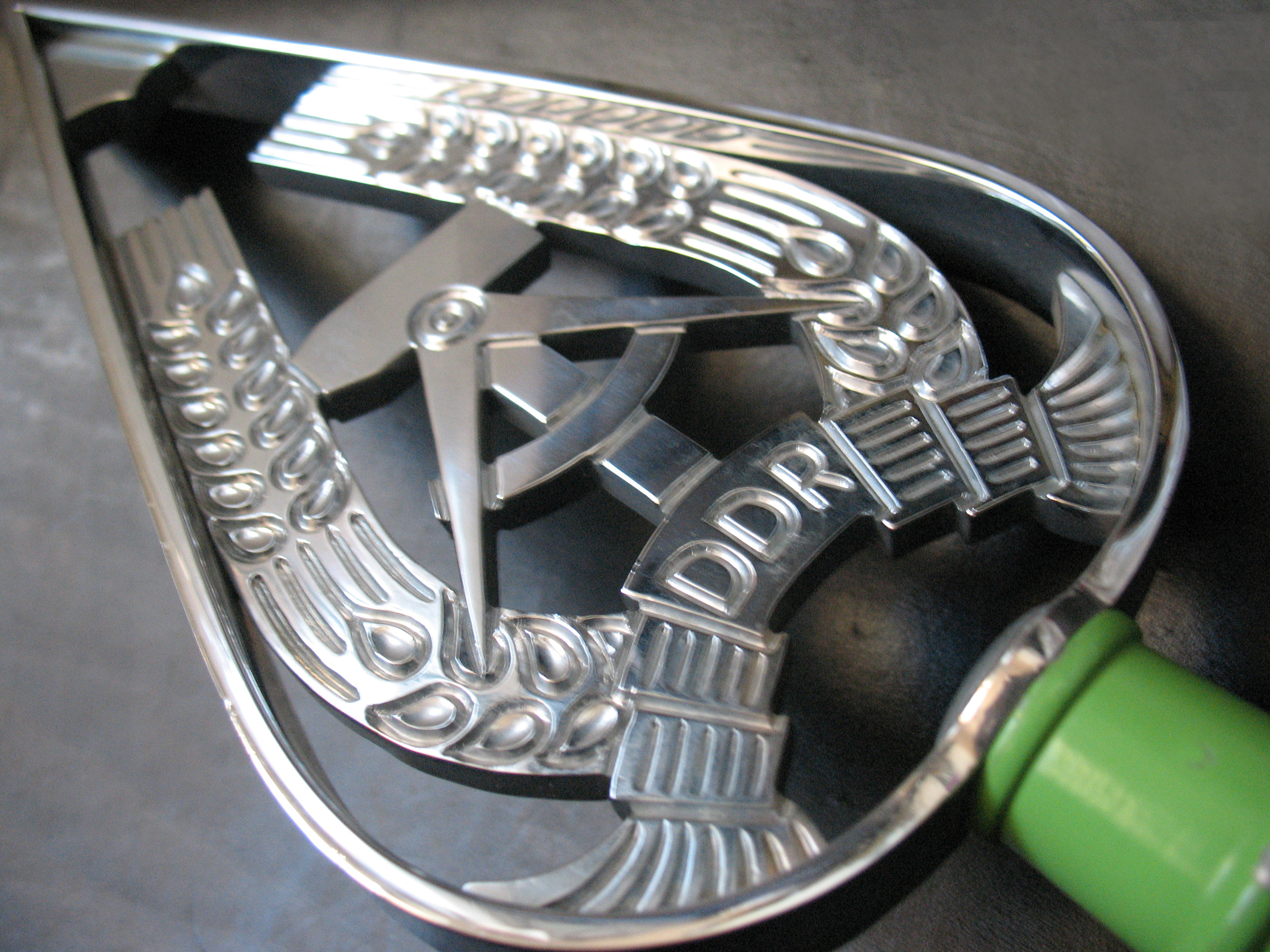 Fahnenspitze Regiment Nationale Volksarmee DDR